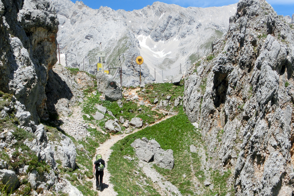 Grenzübergang "Gatterl" Deutschland - Österreich im Wettersteingebirge